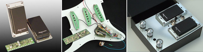 Langcaster Pickups